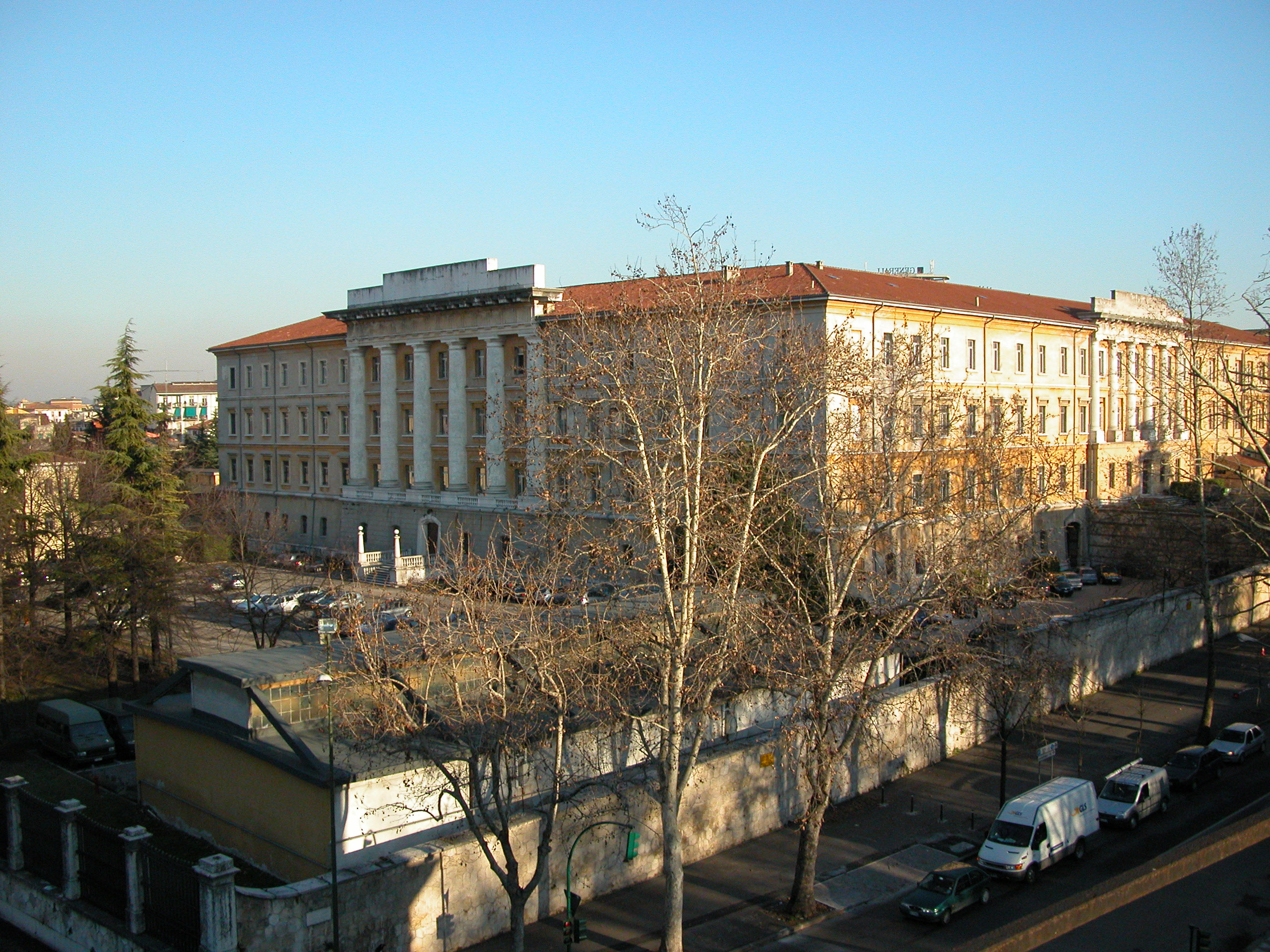 Ospedale Militare di Verona - vista generale presa dal tetto di Porta Palio